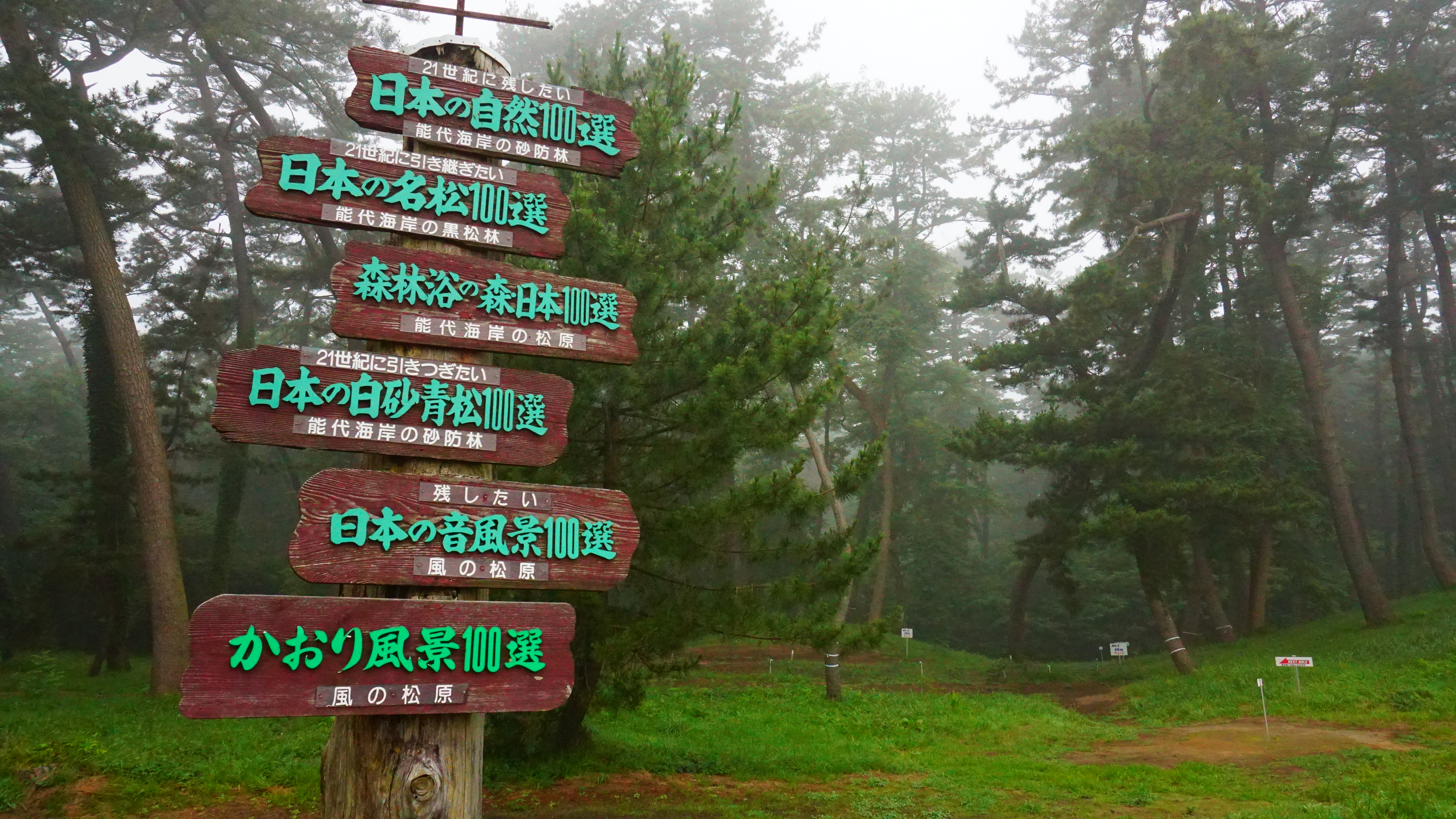 朝靄の中の風の松原（秋田県能代市）